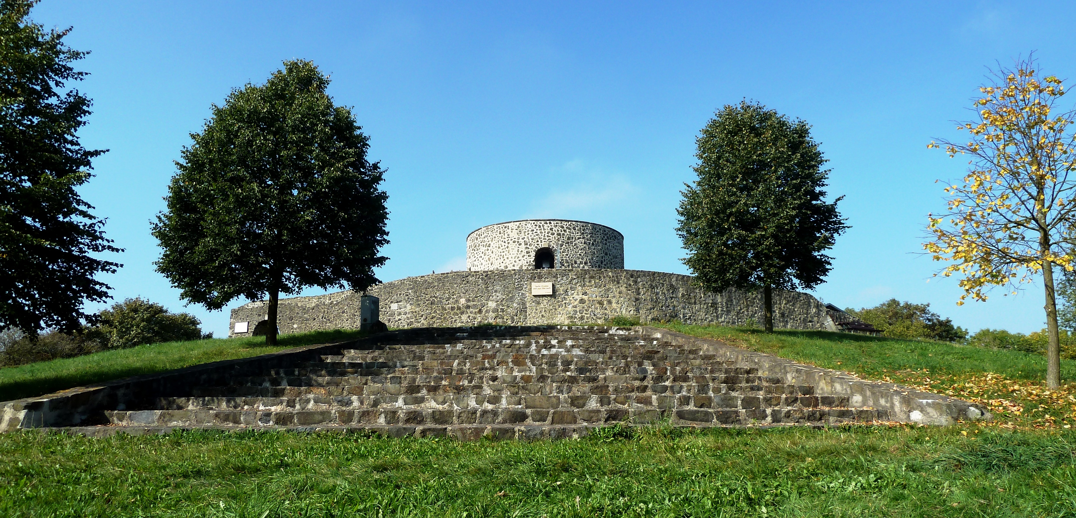 Ansicht des Turms der teilrestaurierten Ruine Heiligenburg auf dem Heiligenberg. Im Vordergrund befindet sich eine Freitreppe, auf der in jüngster Vergangenheit Theaterstücke aufgeführt wurden. Der Heiligenbergverein kümmert sich um die Pflege und Erhaltung der Anlage.